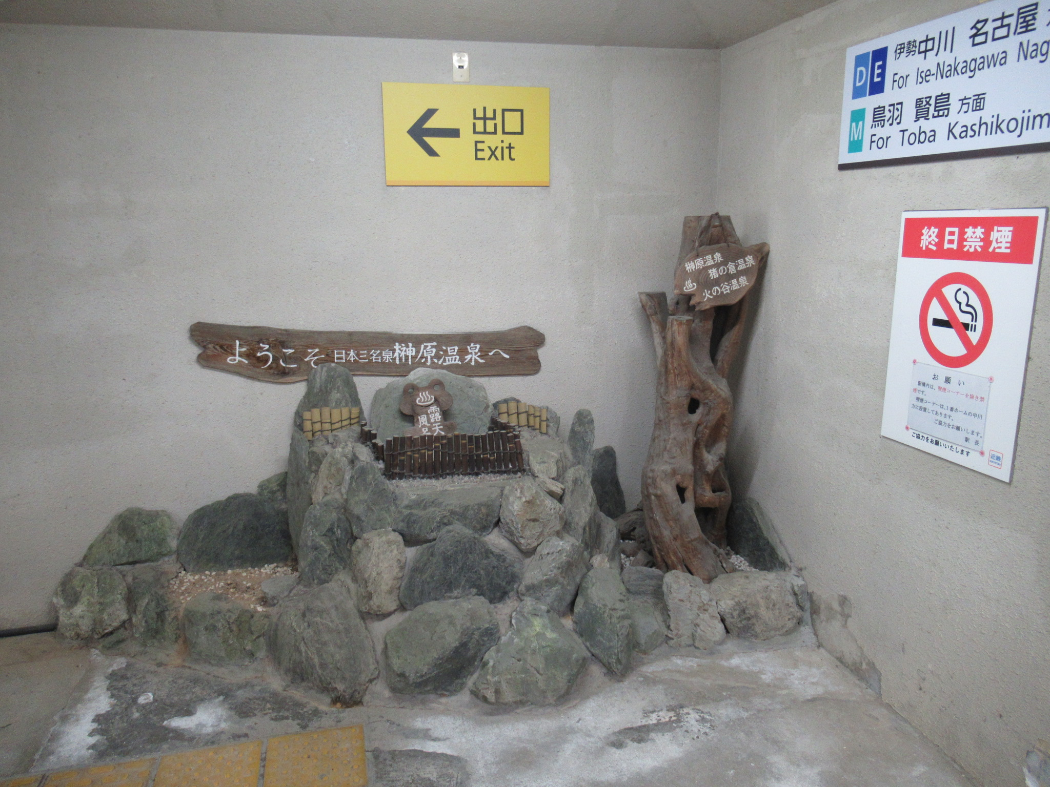 榊原温泉口駅通路のオブジェ